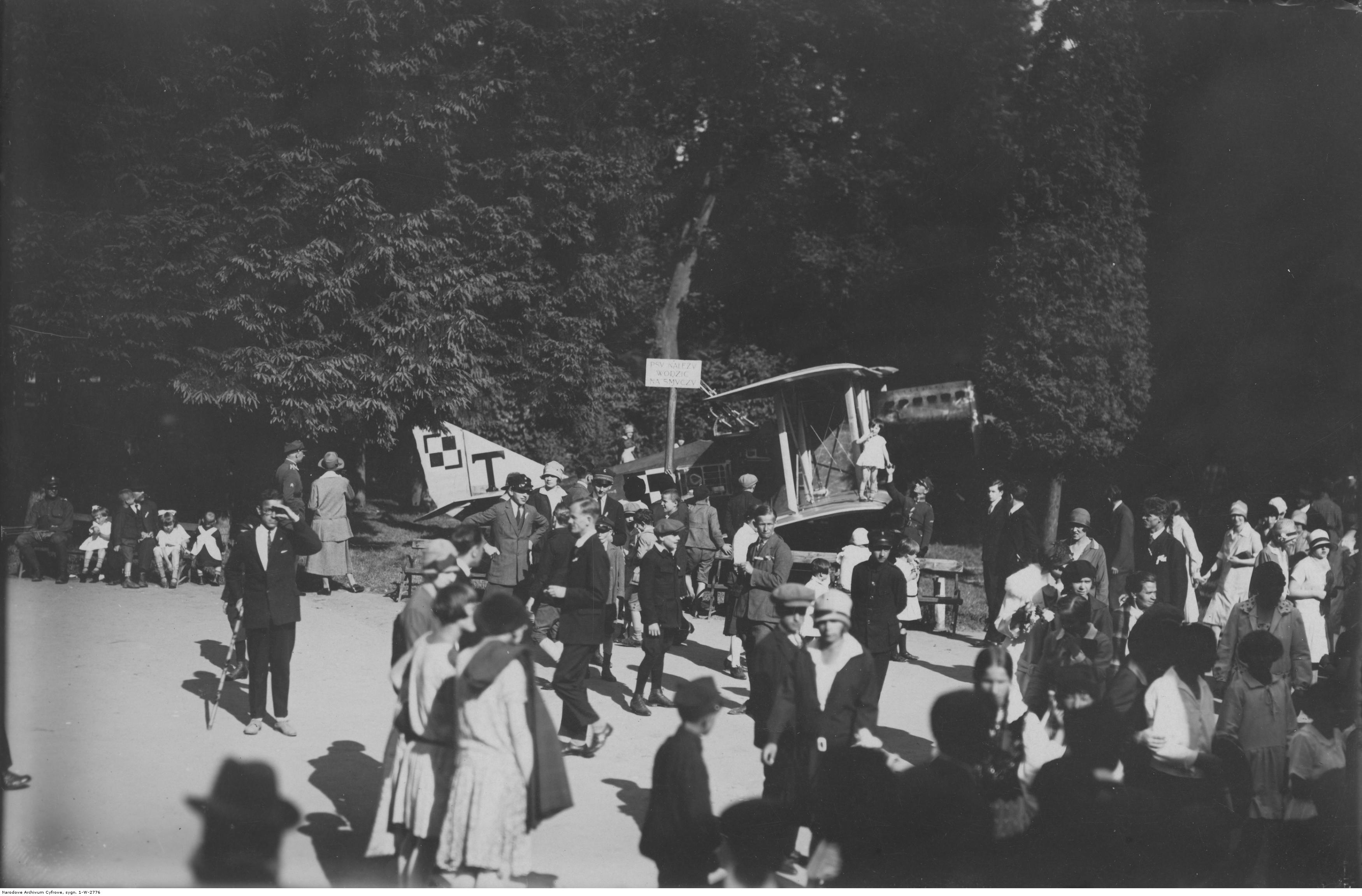 Samolot Ansaldo A-300-4 eksponowany na Wystawie Ligi Obrony Powietrznej Państwa w Parku Jordanowskim w Krakowie.